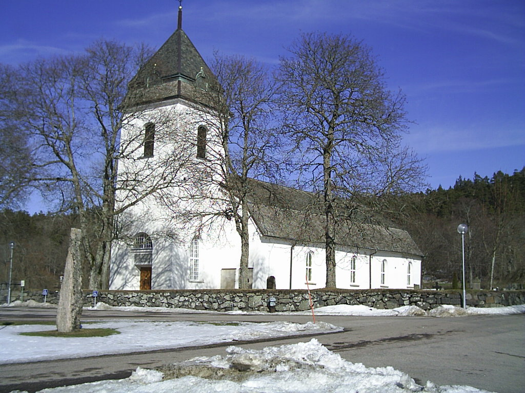 Västra Tunhems kyrka. Fotograf:Tubaist.